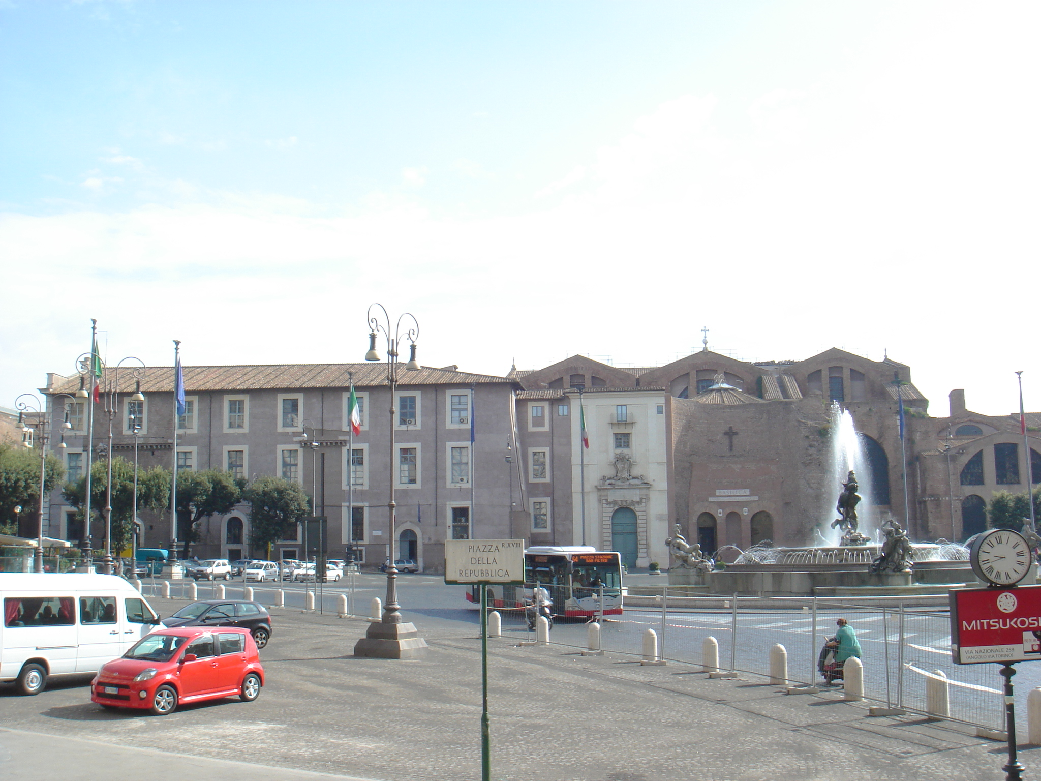 Roma, piazza della Repubblica: Terme di Diocleziano